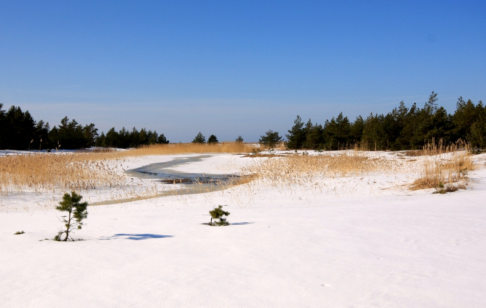 Nõva Läänemaal. Taamal suubumine merre läbi rändava jõesuudme.